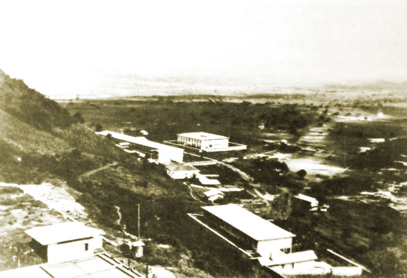 Foto del sector donde hoy se encuentra el barrio de La Atarazana, Guayaquil, a principios del siglo XX.